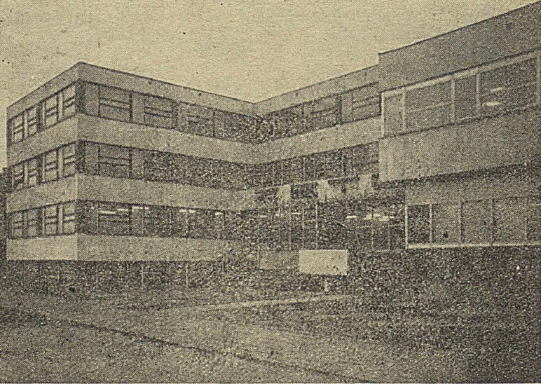 Katowice, ZETO